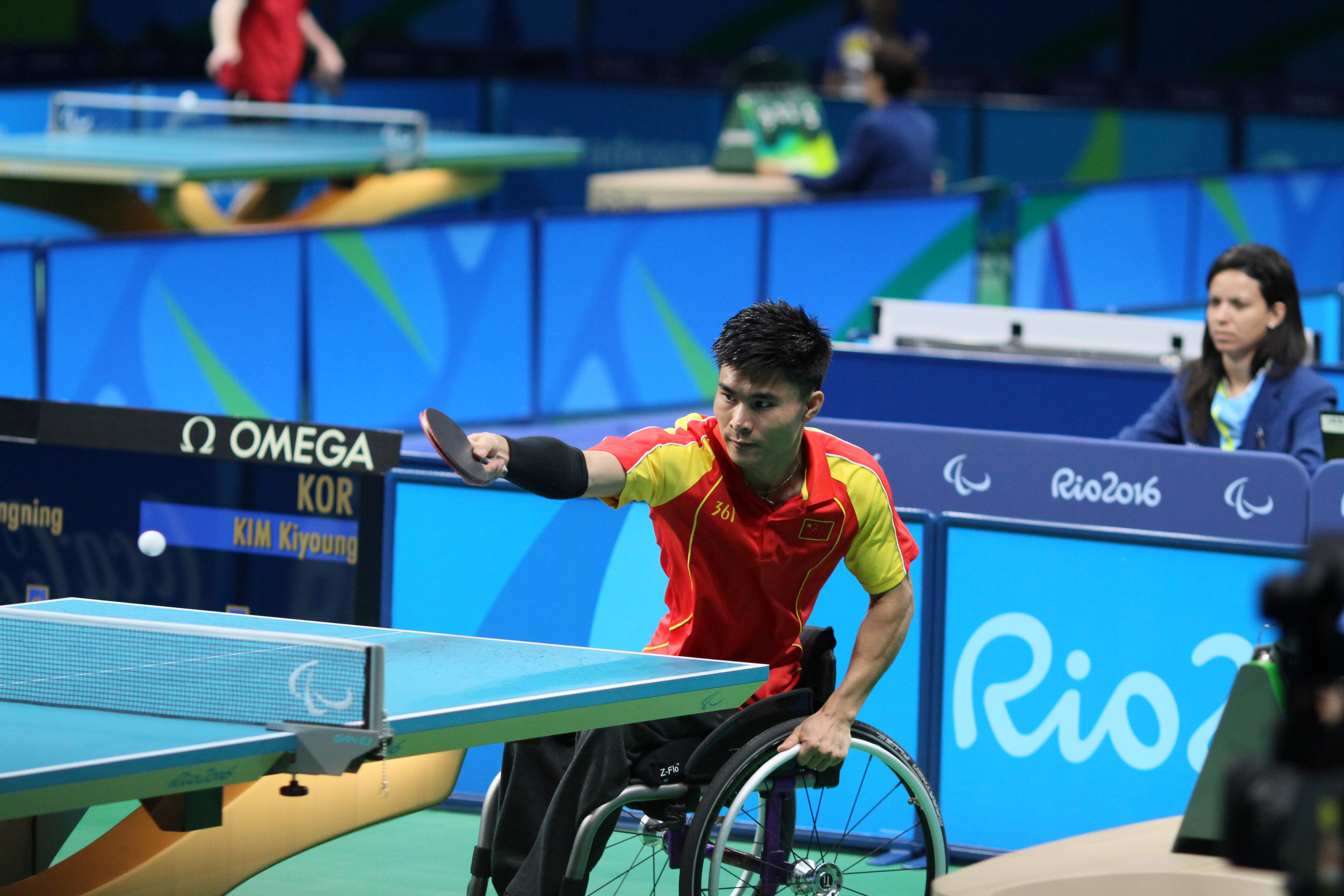 CAO Ningning (CHN,M5) IMG_5081